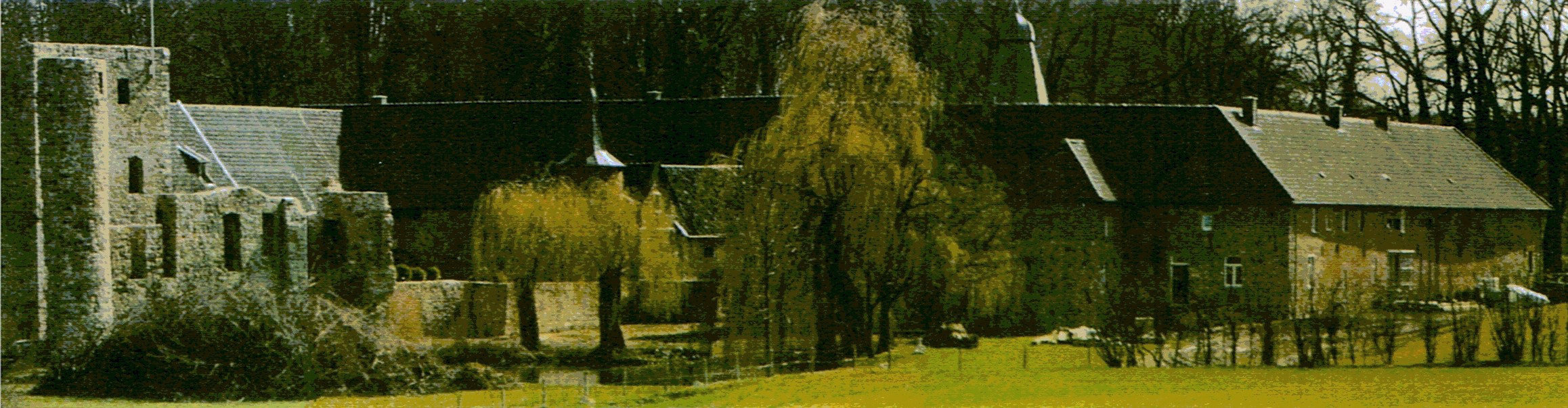 Haus Heyden nach der umfangreichen Restaurierung in den Jahren 2002/2003, Blick auf die Nordwest-Seite der Burganlage